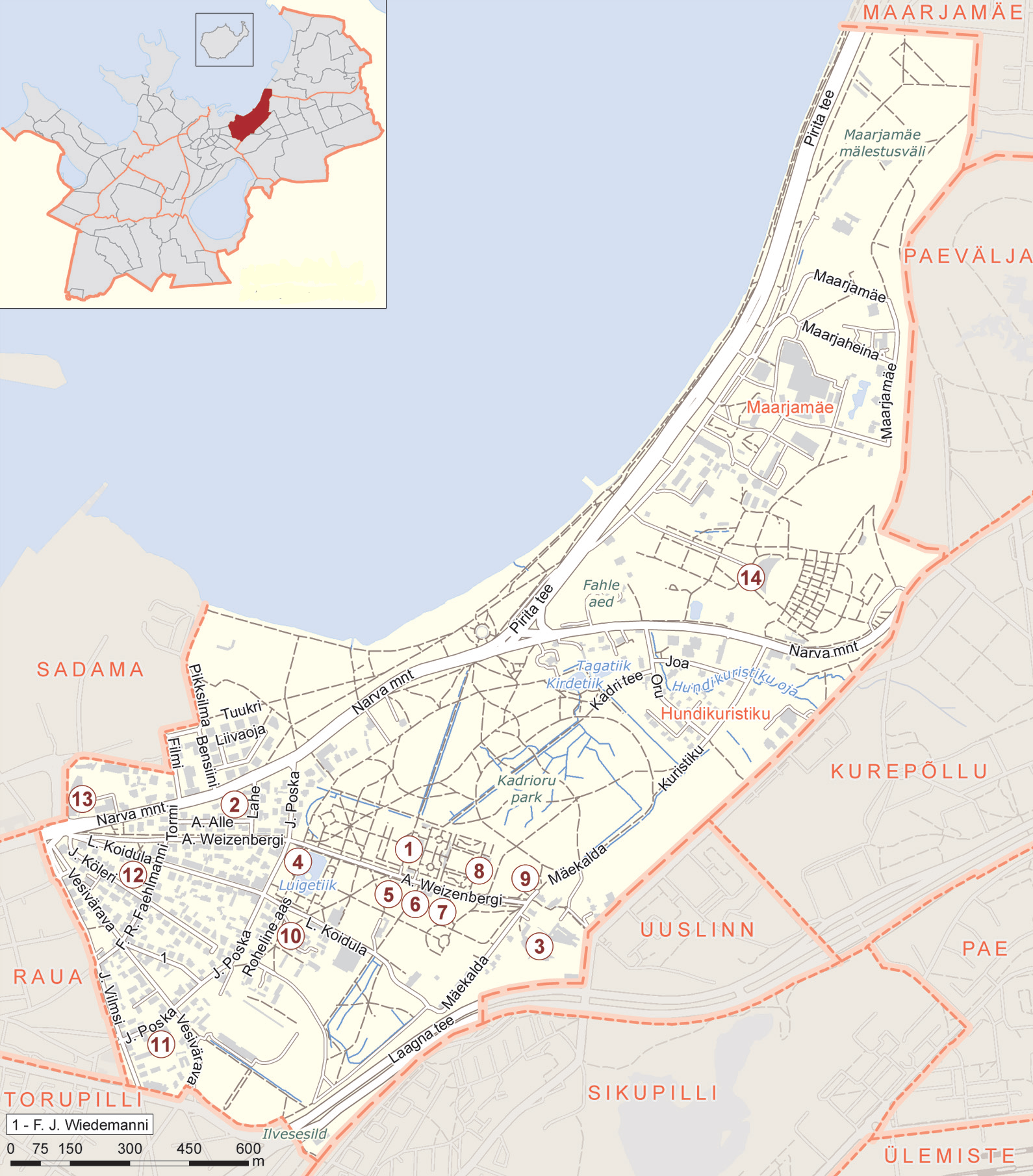 Kadrioru asumi kaart